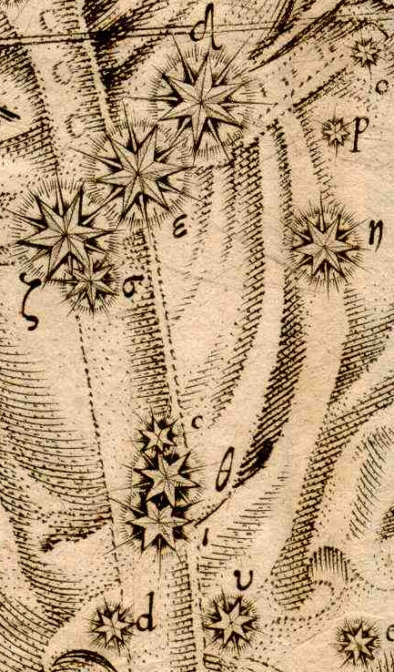 חלק של מפת אוריון מתוך אורנומטריה